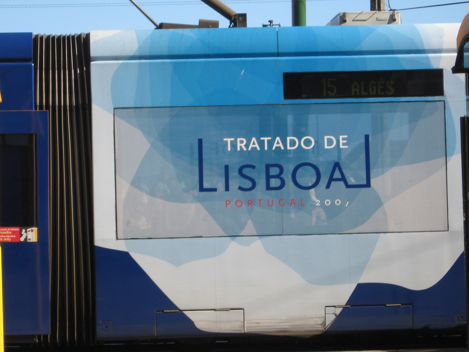 Eléctrico lisboeta alusivo ao Tratado de Lisboa 2007